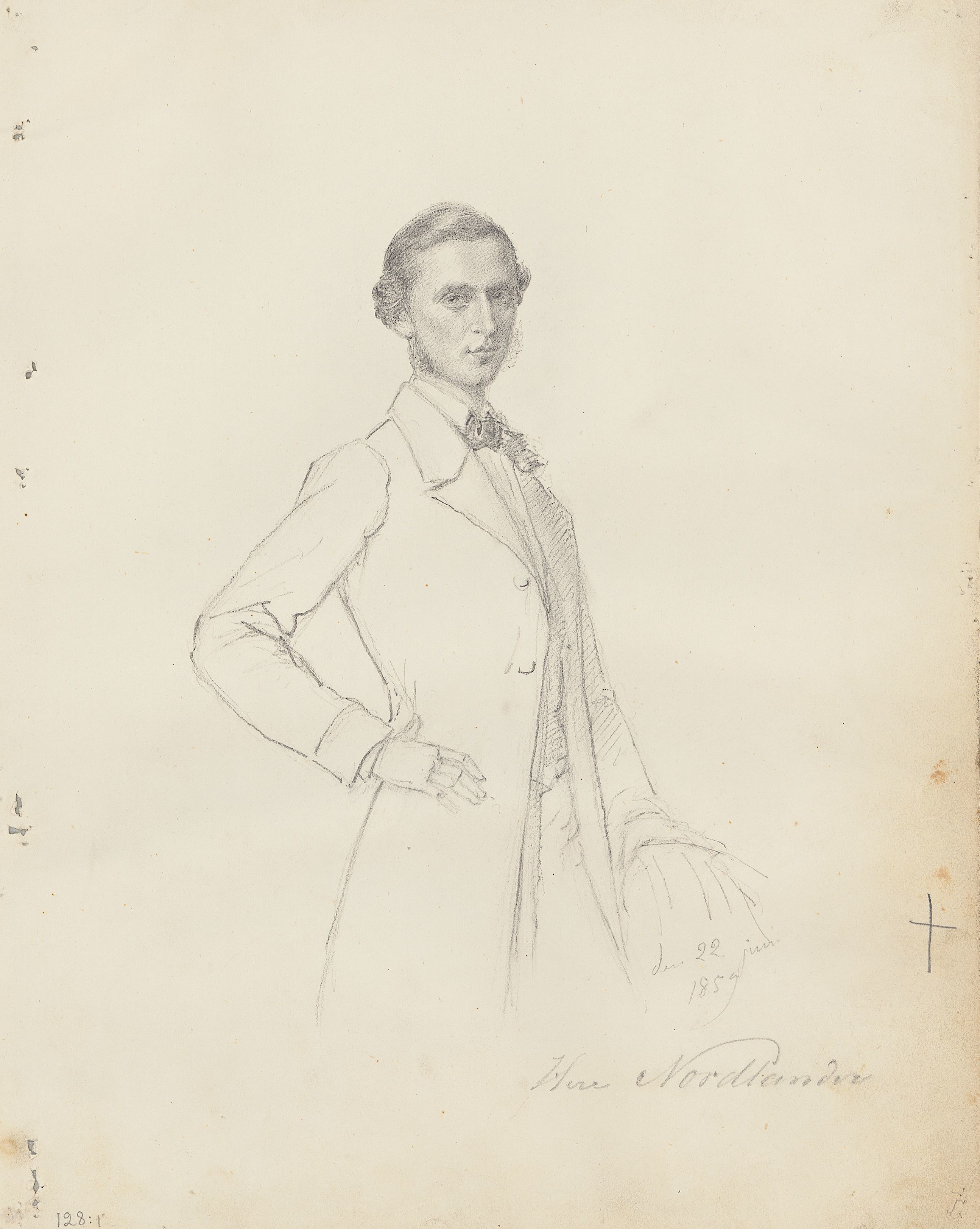 "Med påskrift: den 22 juni 1859.- Herr Nordlander."